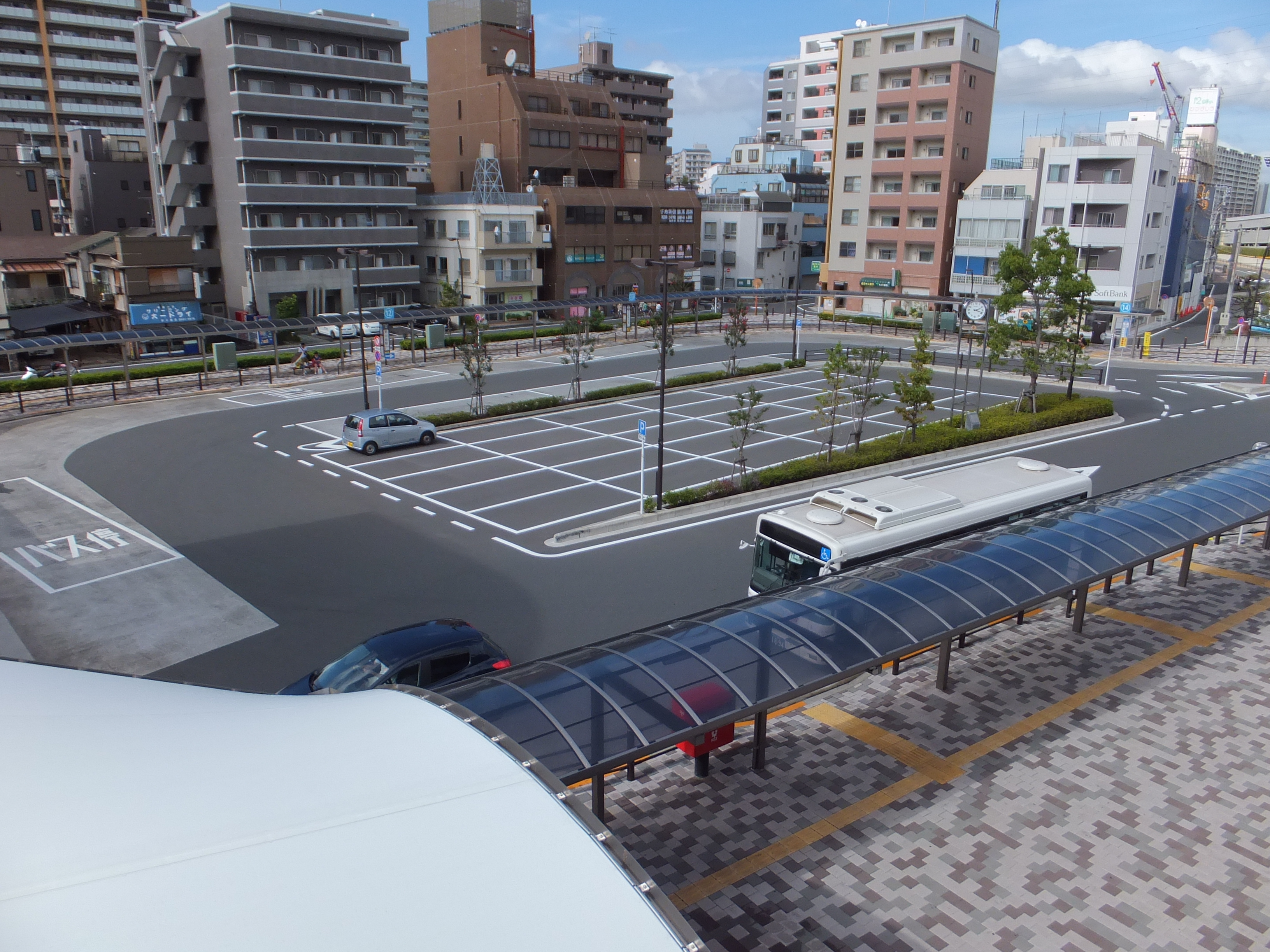 新小岩駅東北広場（2013年9月15日撮影）